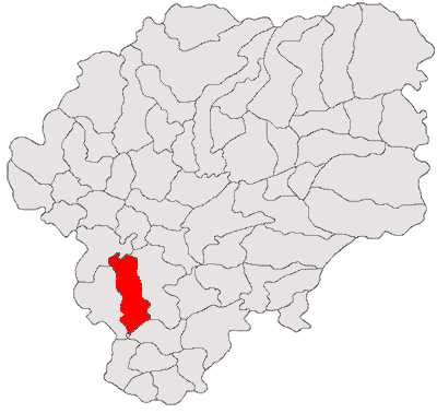 Categorie:Hărţi ale judeţului Bistriţa-Năsăud